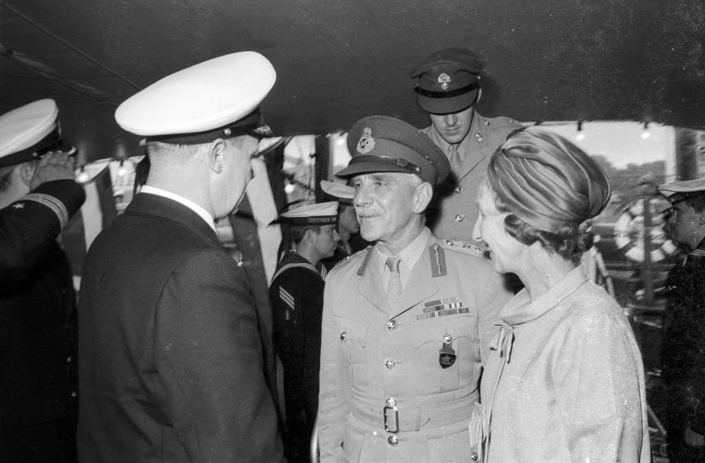 Empfang auf dem Zerstörer SCHLESWIG-HOLSTEIN (D 182). Der Oberbefehlshaber der Bundesmarine, Vizeadmiral Karl Hetz, begrüßt Darling und seine Frau.